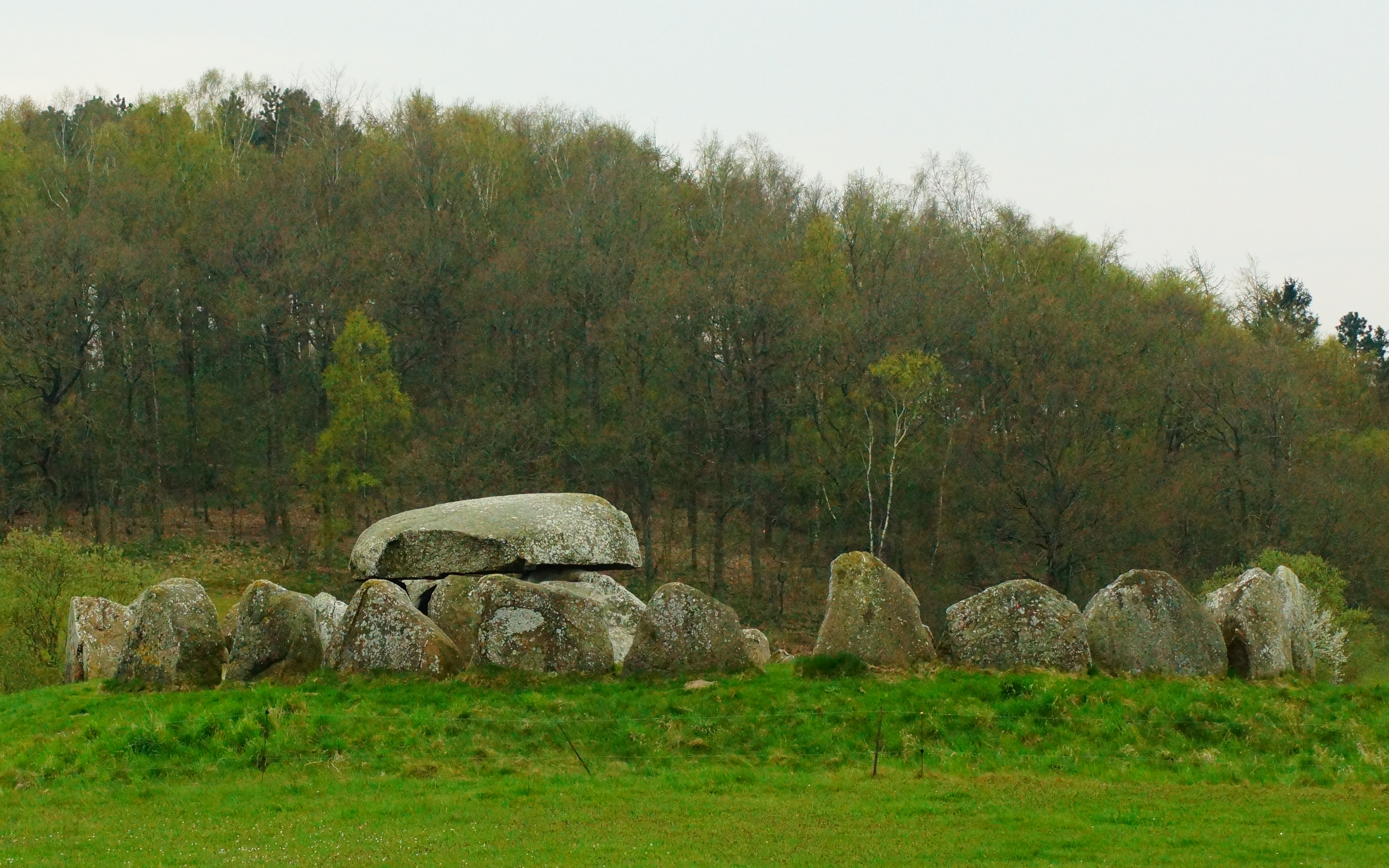 Poskær Stenhus, forår 2015